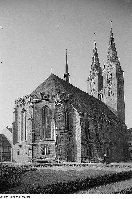 Original image description from the Deutsche Fotothek Stendal. St. Marien, Chor